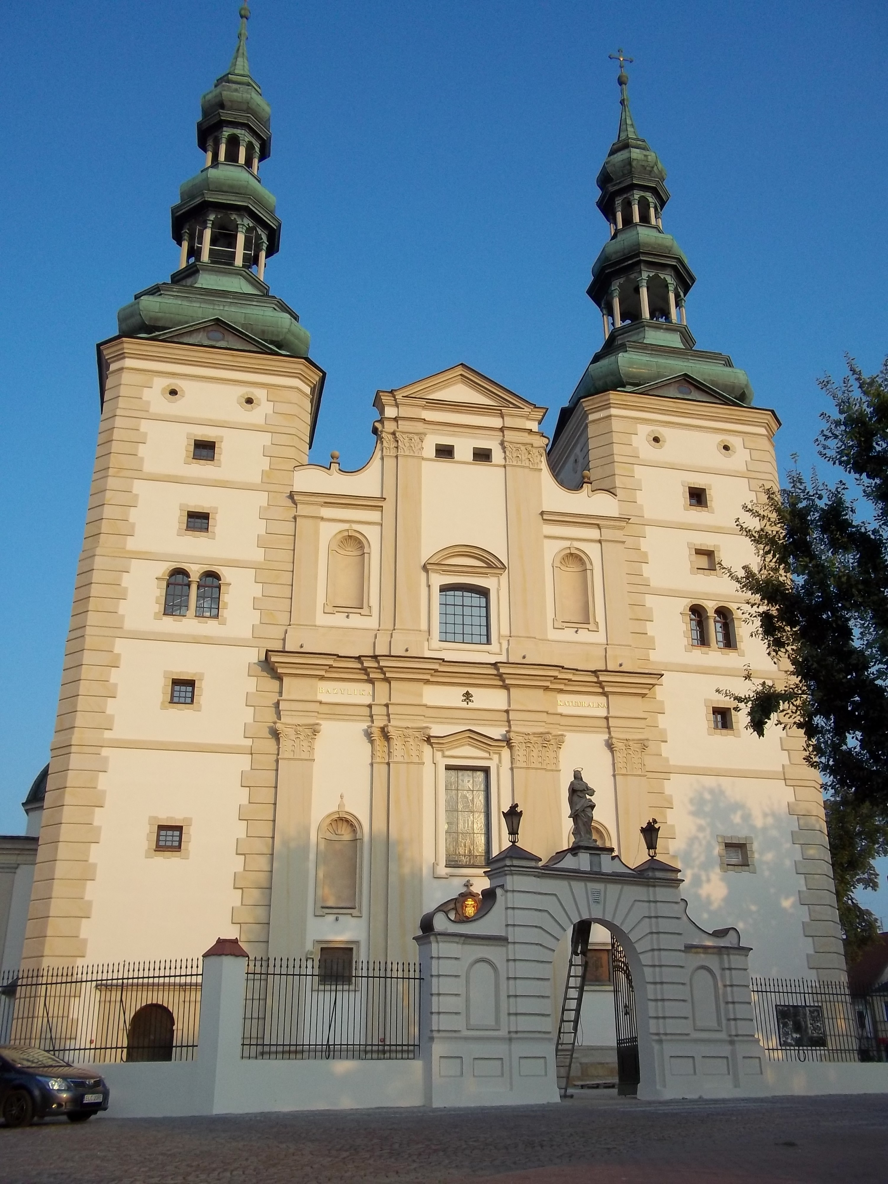 zabytki Łowicza kośćiół kolegiacki p.w. Wniebowzięcia NMP, XVw, XVIIw-XVIIw, obecnie Bazylika